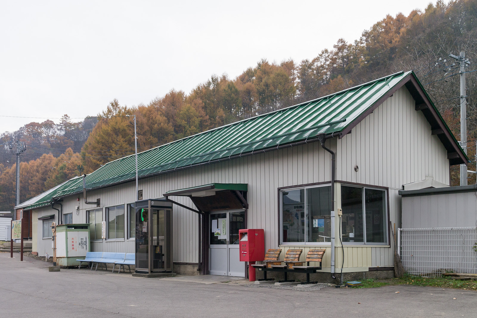 JR東日本小海線信濃川上駅、長野県南佐久郡川上村。